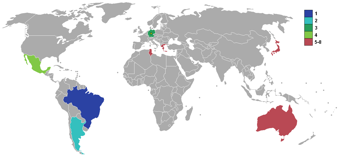 FIFA Confederations Cup 2005 made from Image:BlankMap-World-v5.png, showing